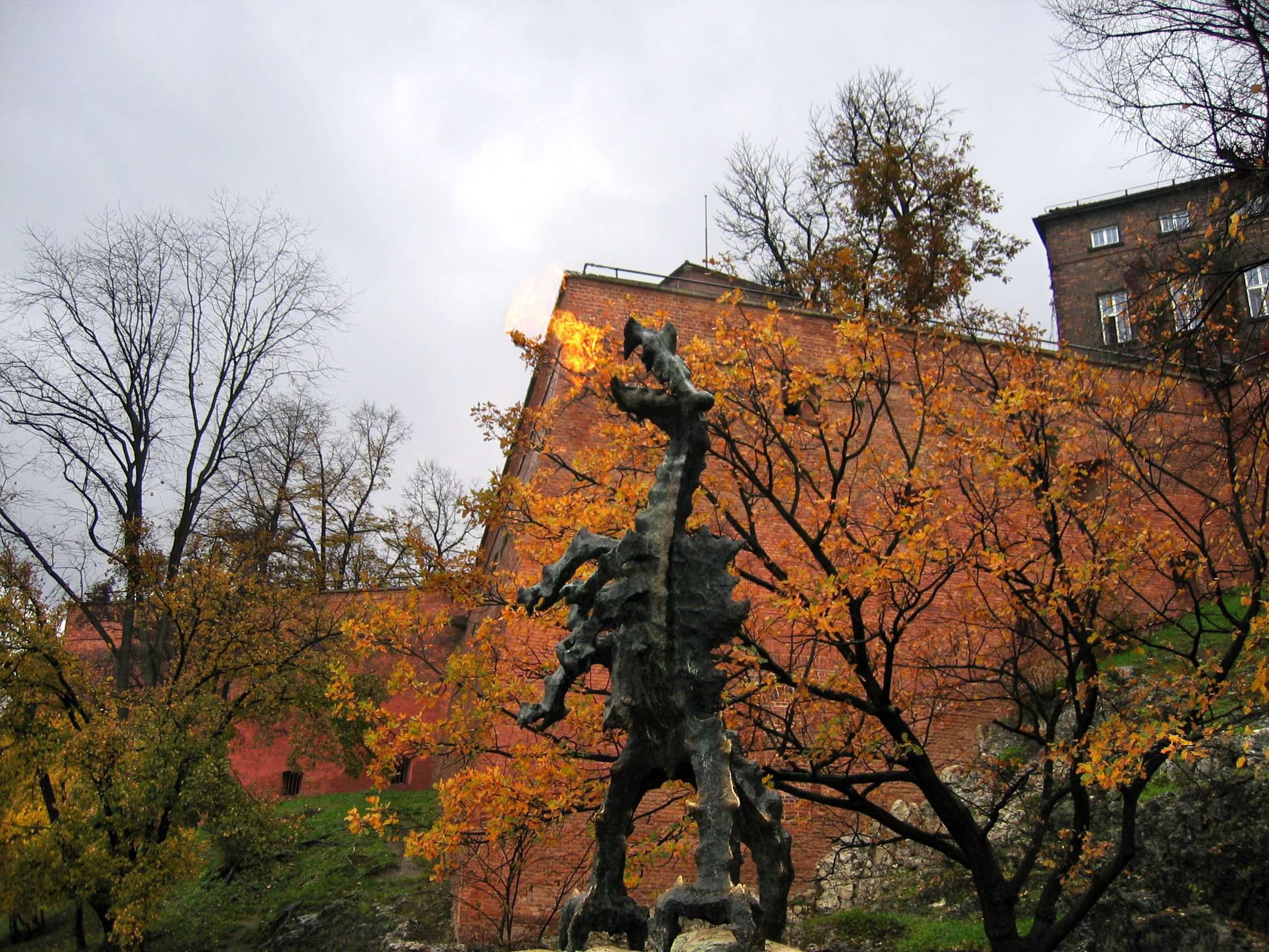 Waweldrachen "Smok Wawelski"